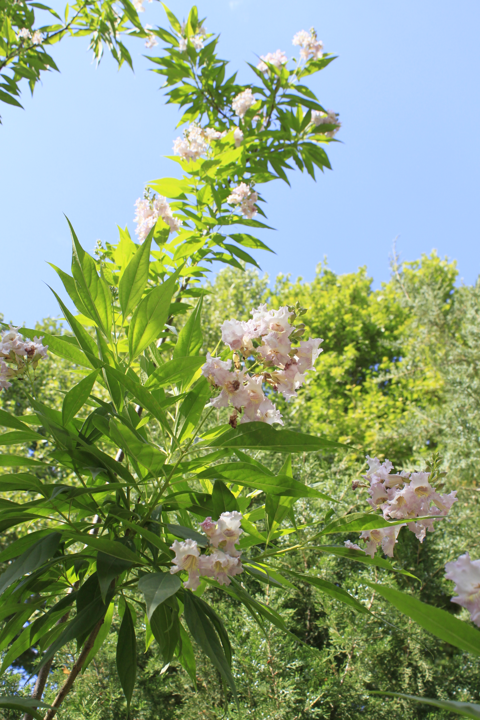 Chitalpa tashkentensis mit rosa Blüten